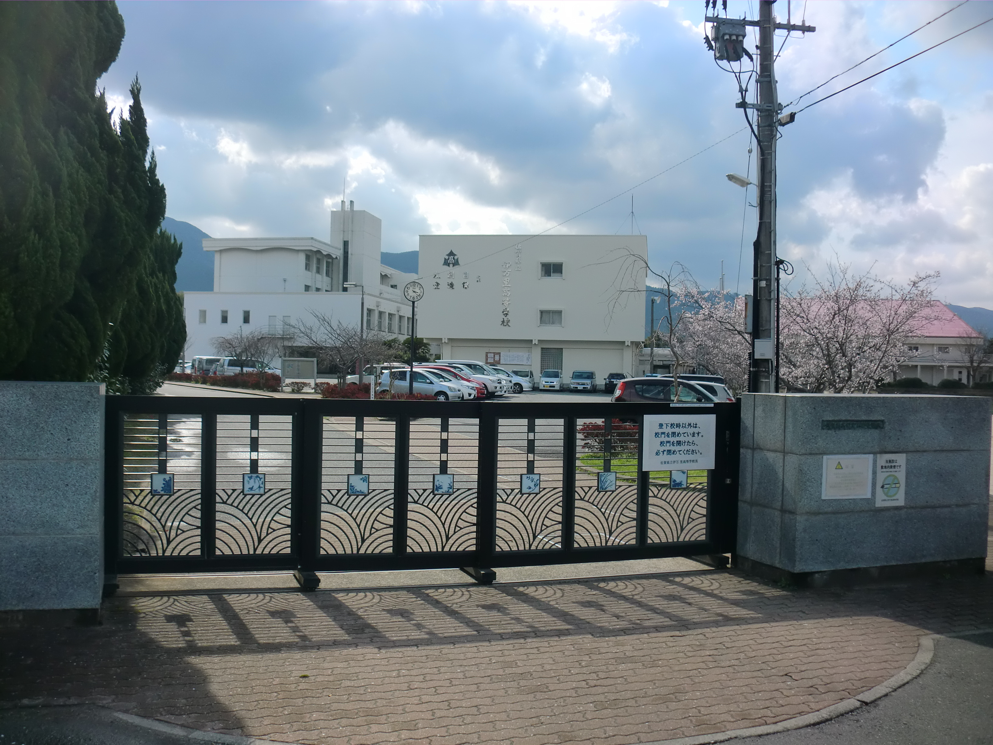 佐賀県伊万里市にある佐賀県立伊万里高等学校